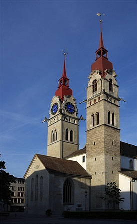 Stadtkirche von Winterthur (Nr. 03.1-5350)